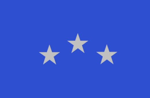 Bandera del Partido de Florentino Ameghino (Buenos Aires, Argentina).